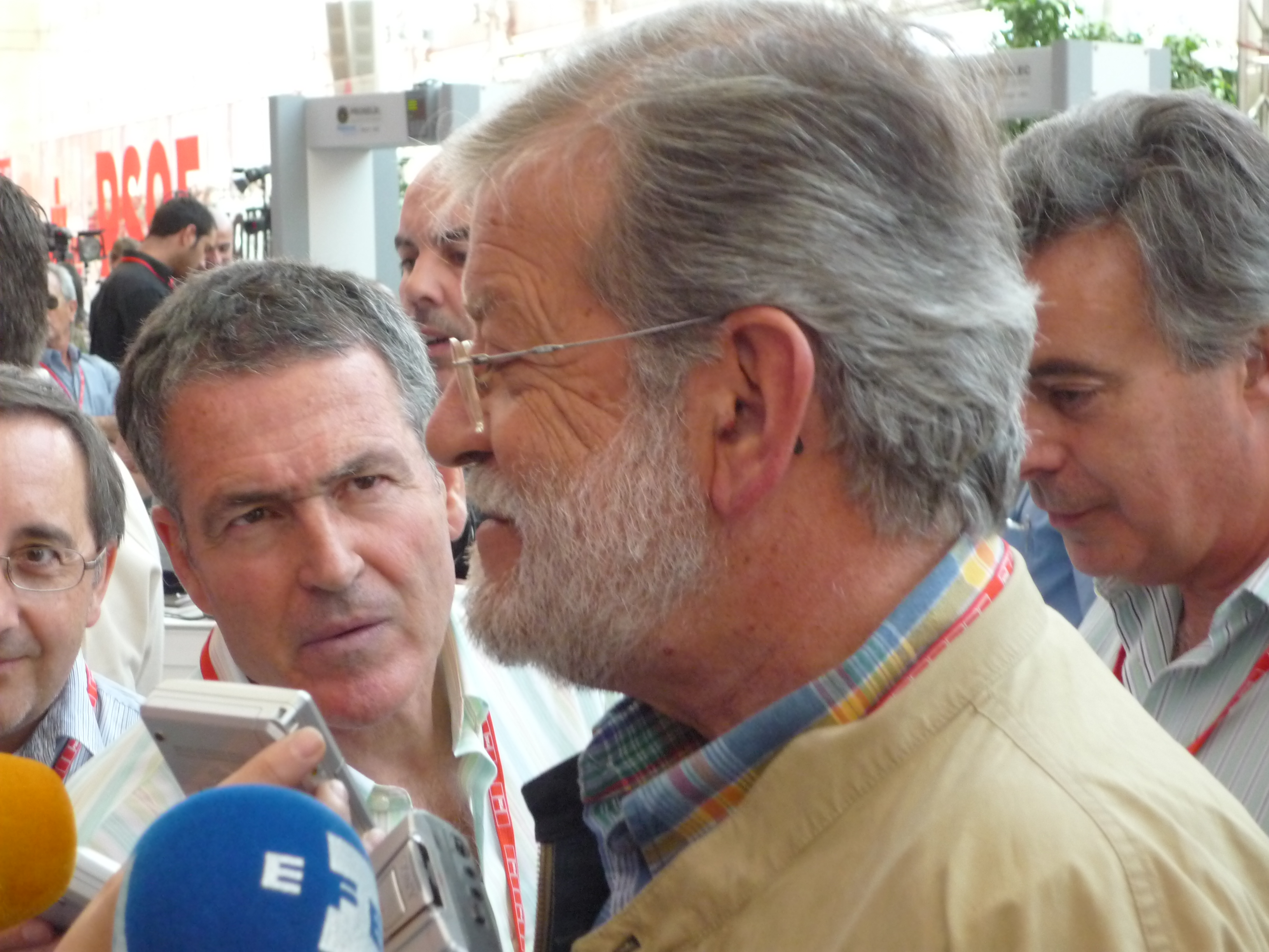 Juan Carlos Rodriguez Ibarra en el 27 Congreso del PSOE en julio de 2008.